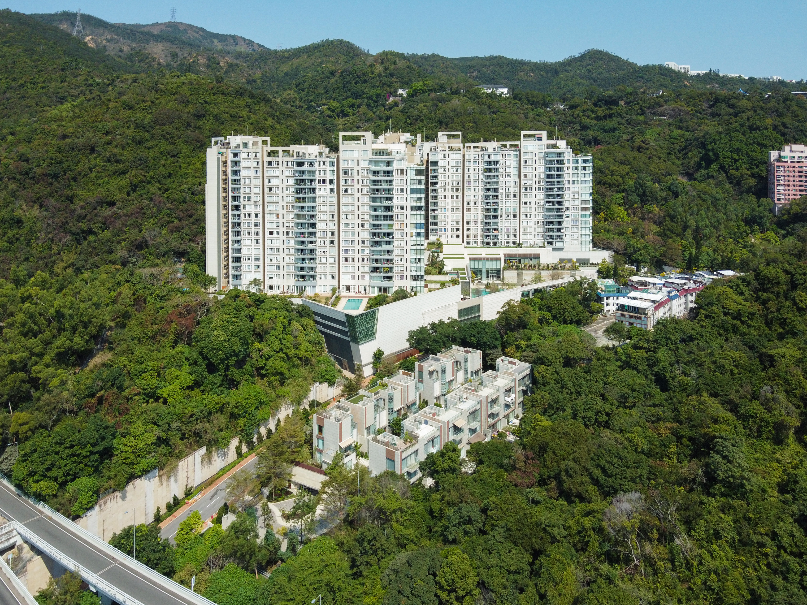 Peak One